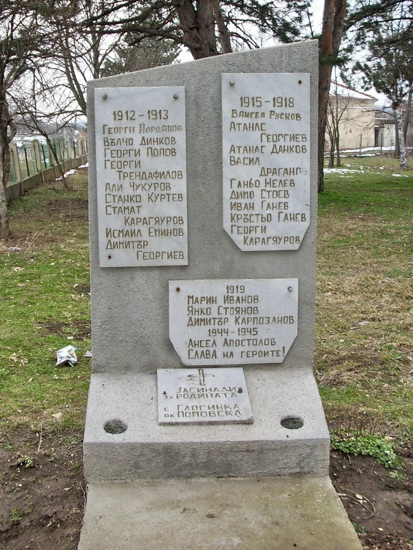 Село Глогинка, община Попово. Паметникът на загиналите от селото войници във войните.